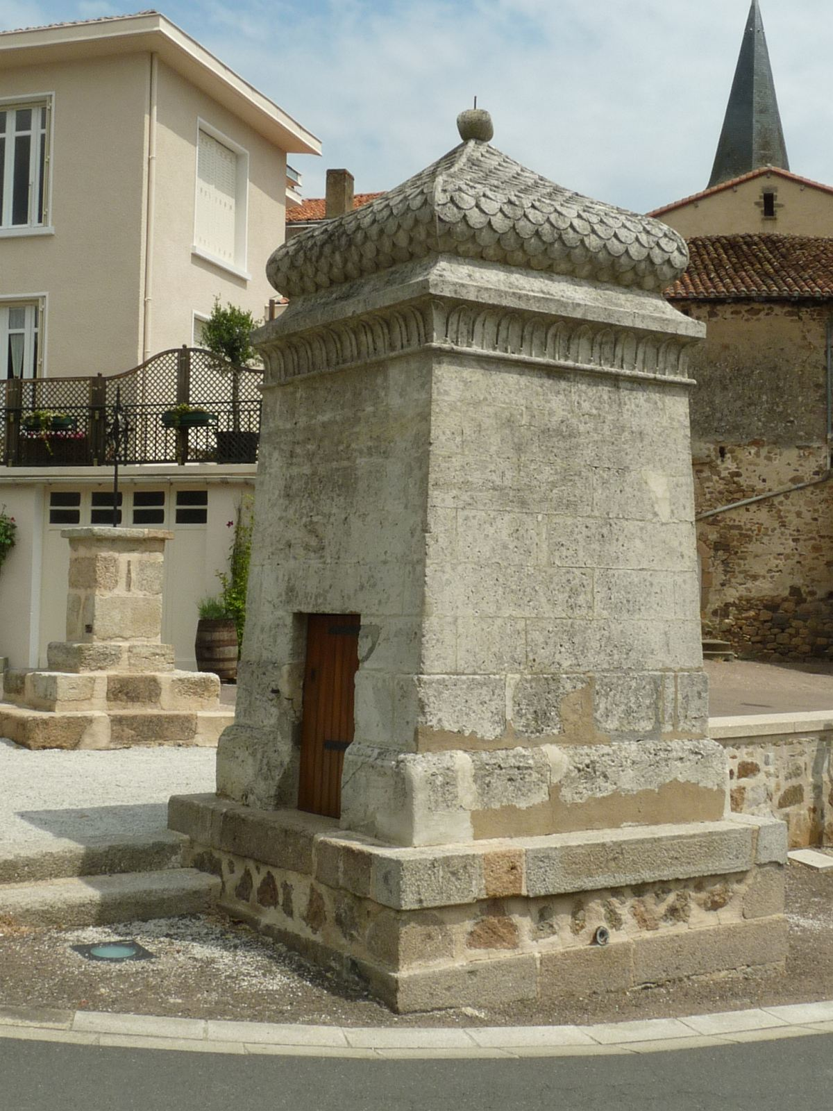 Fontaine à Brillac, Charente, France